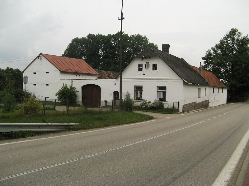 Usedlost čp. 13, Jilem 13, Jilem (okres Jindřichův Hradec).